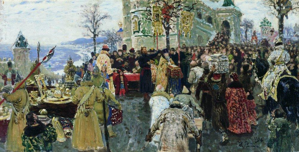 Sketch